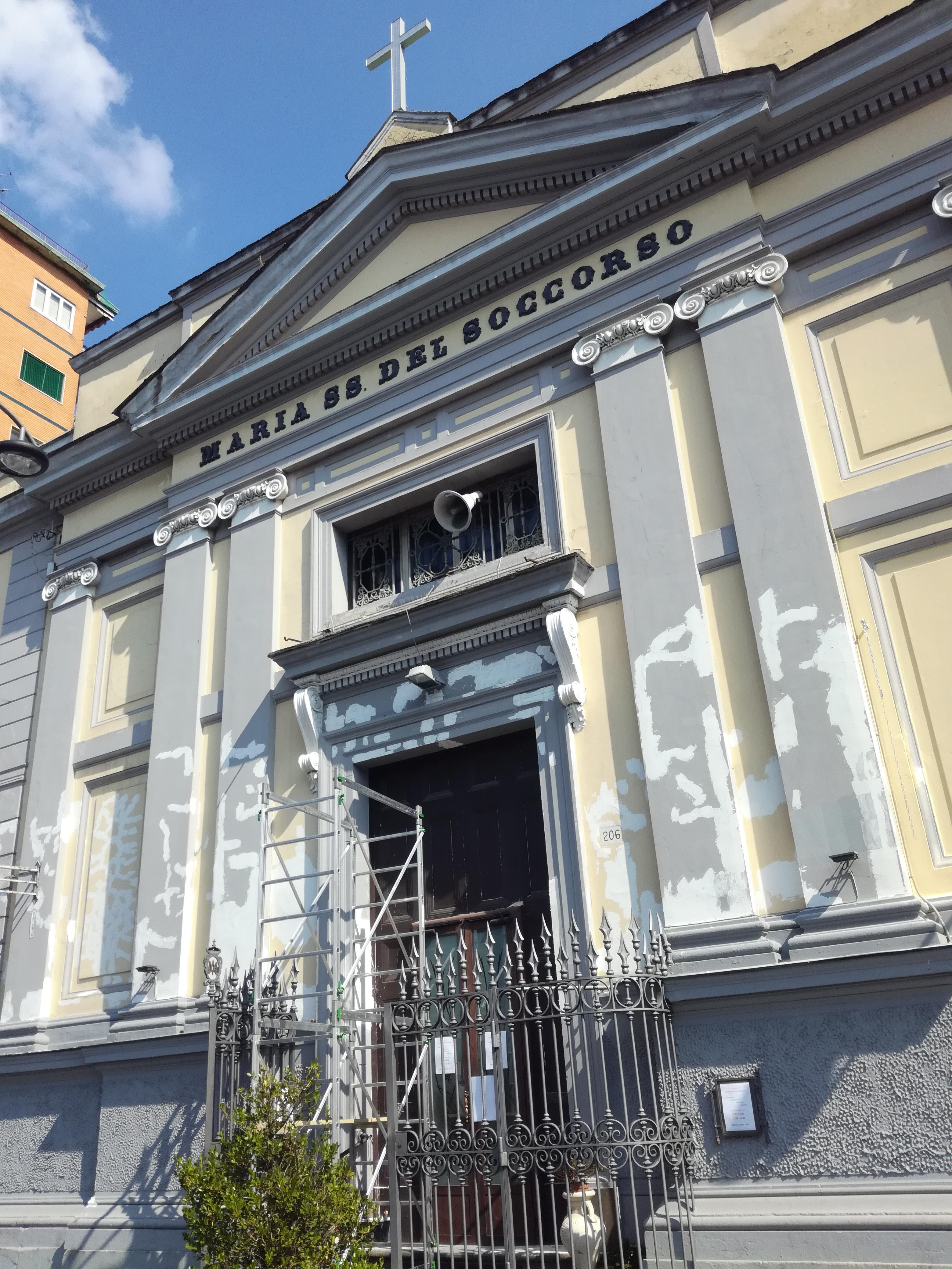 Chiesa di Santa Maria del Soccorso a Capodimonte (Napoli)